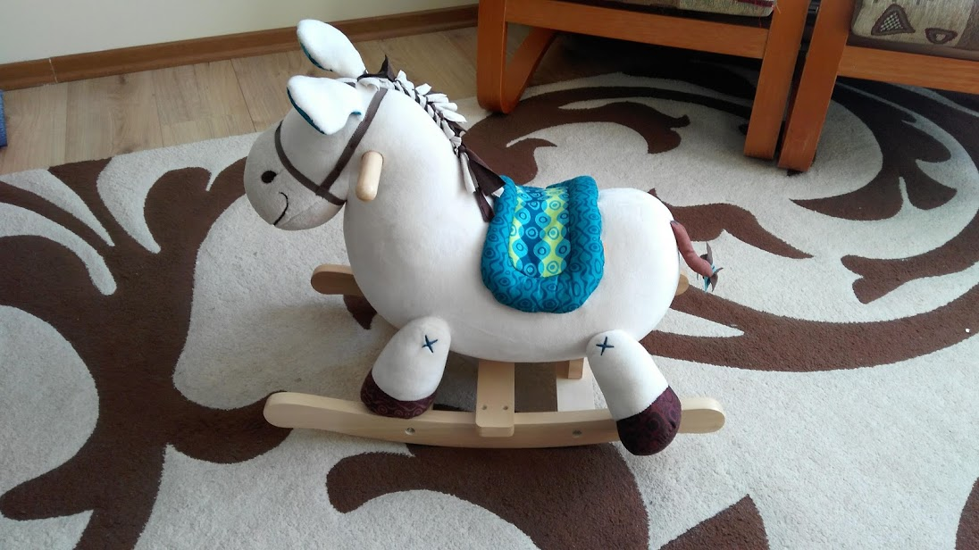 Кінь-качалка в дитячій кімнаті